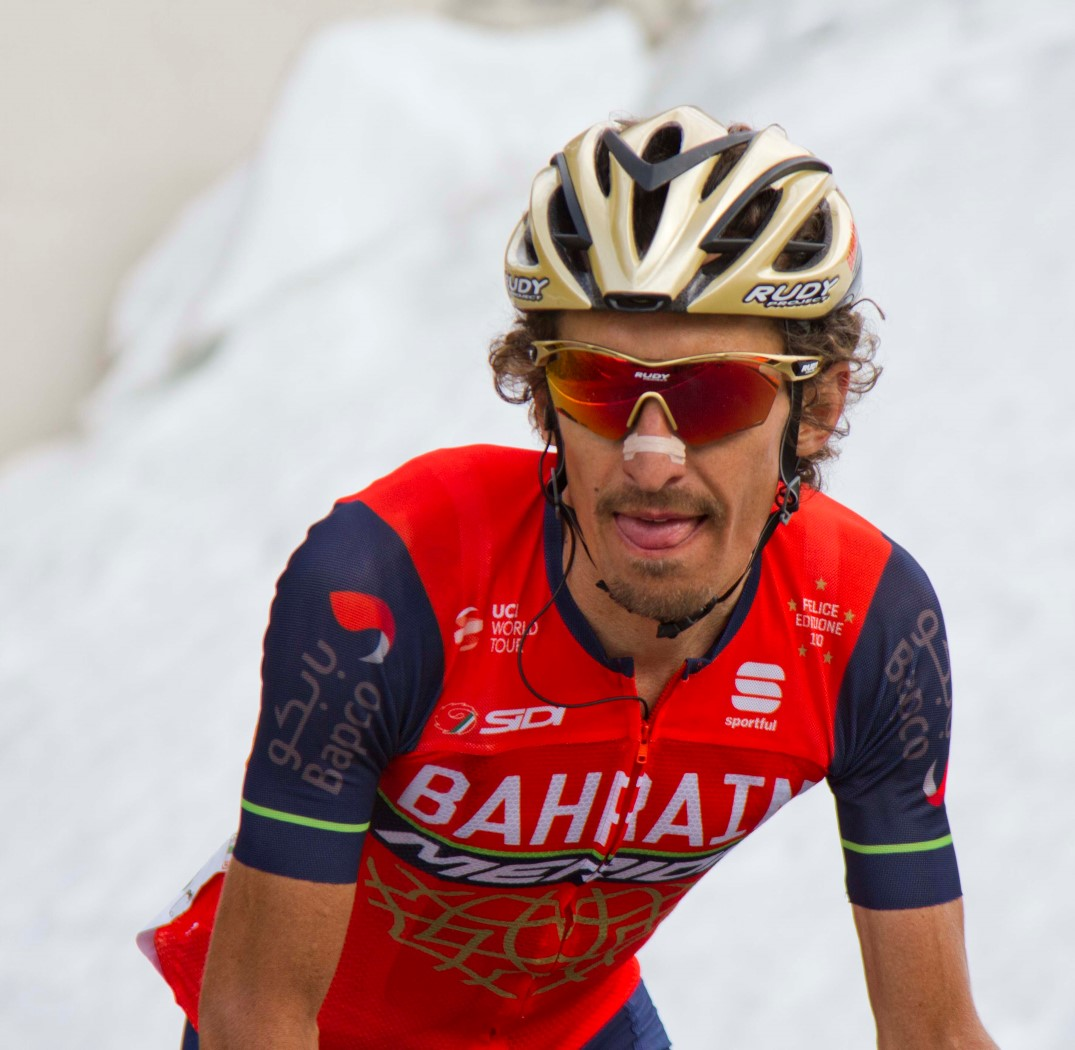 057 pellizotti